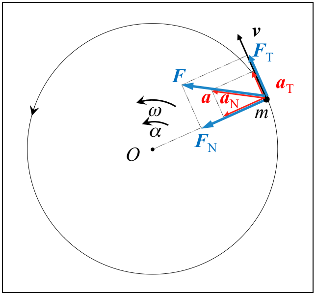 Higidura zirkularreko indar tangentziala eta indar normala adierazten duen eskema, azelerazio angeluarra dagoen kasu orokorrean.